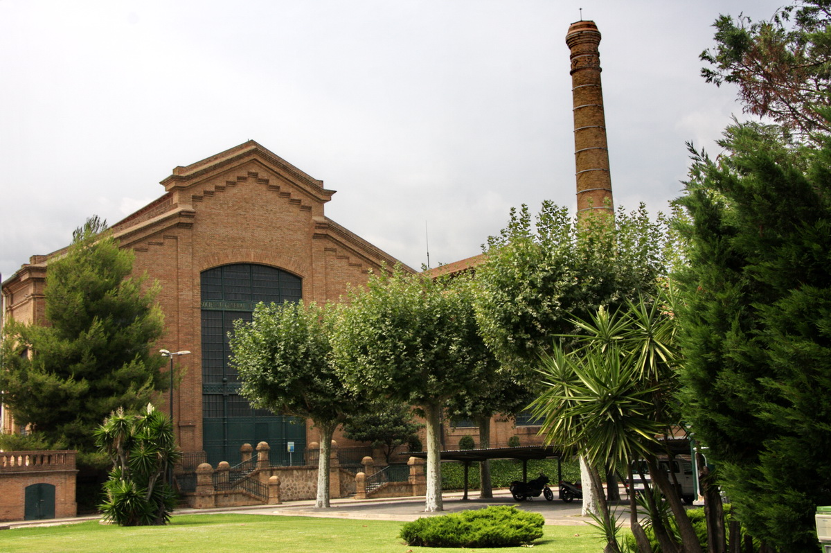 Antiga Estació de bombeig d'aigües a Barcelona, ubicada a Cornellà de Llobregat, és obra de Josep Amaargós i Samaranch de 1903-1907. Actualment és seu del Museu Agbar de les Aigües (Agbar water museum)